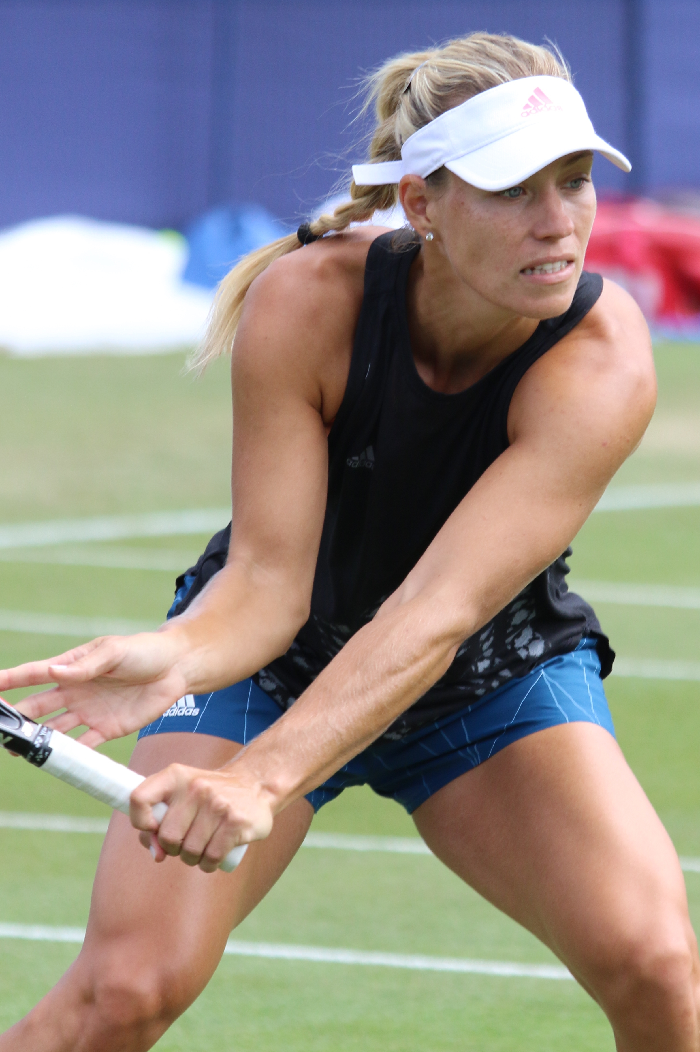 Kerber EBN17 (18)